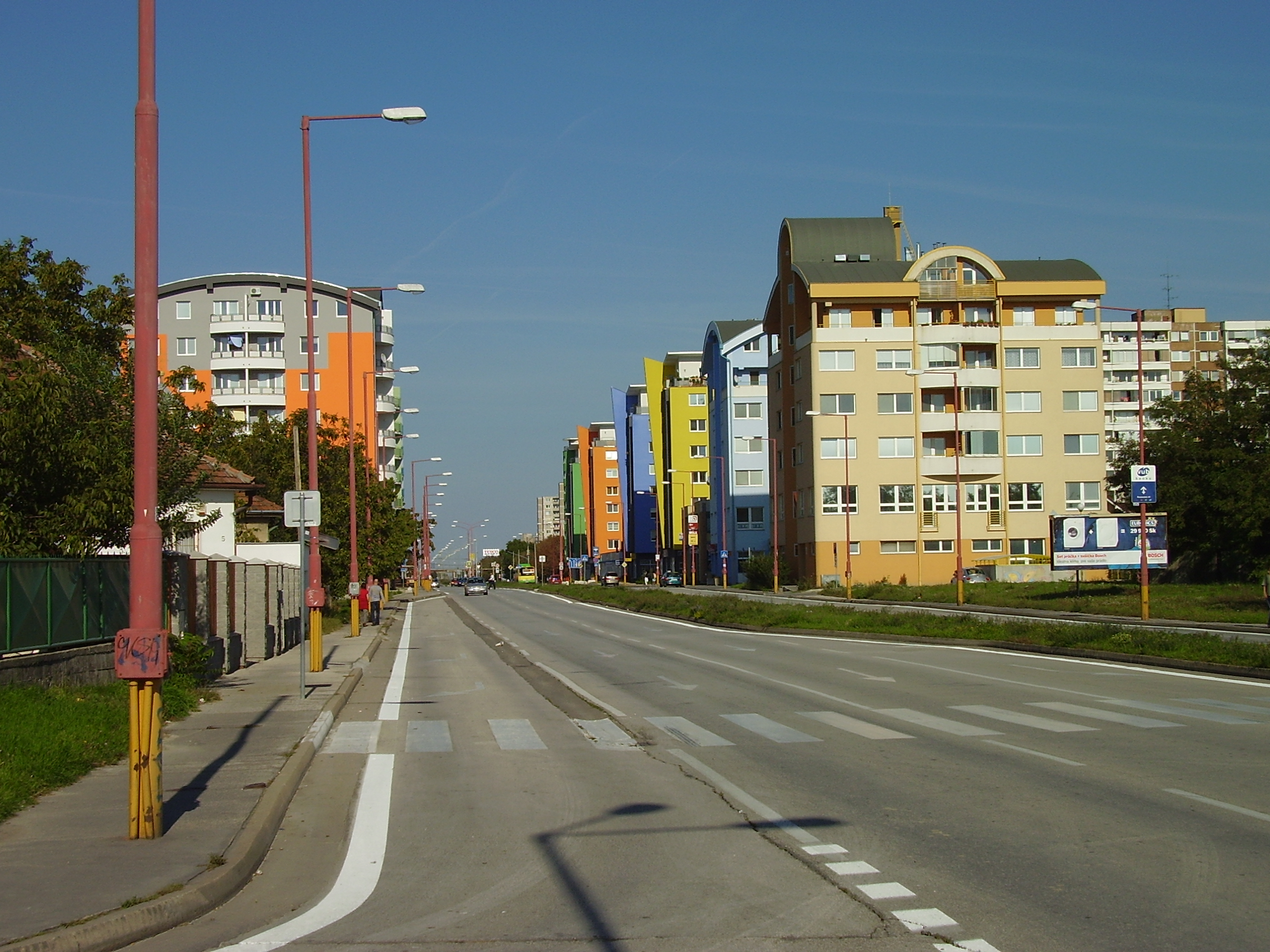 Bratislava